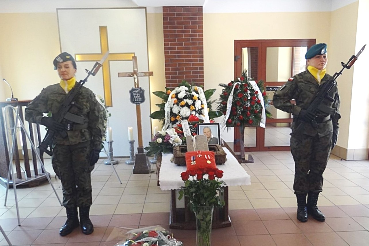 Ppłk Witold Hałat - ostatnie pożegnanie